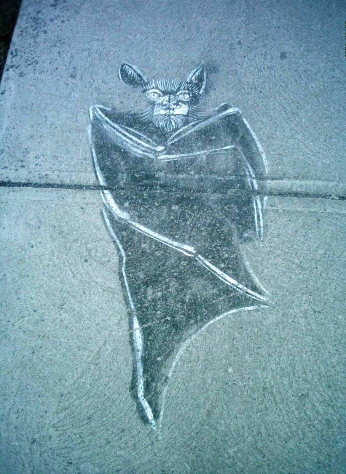 Image peinte au pochoir par Roadsworth (Peter Gibson) sur un trottoir de la rue Jeanne-Mance à Montréal